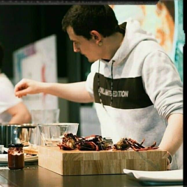 Gorka Barredo cocina en el showcooking en directo de EITB Gastroshow en Bilbao